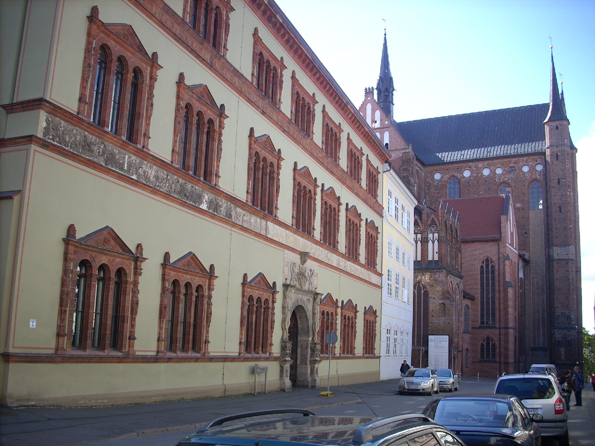 Fürstenhaus Nordseite, im Hintergrund St. Georgen